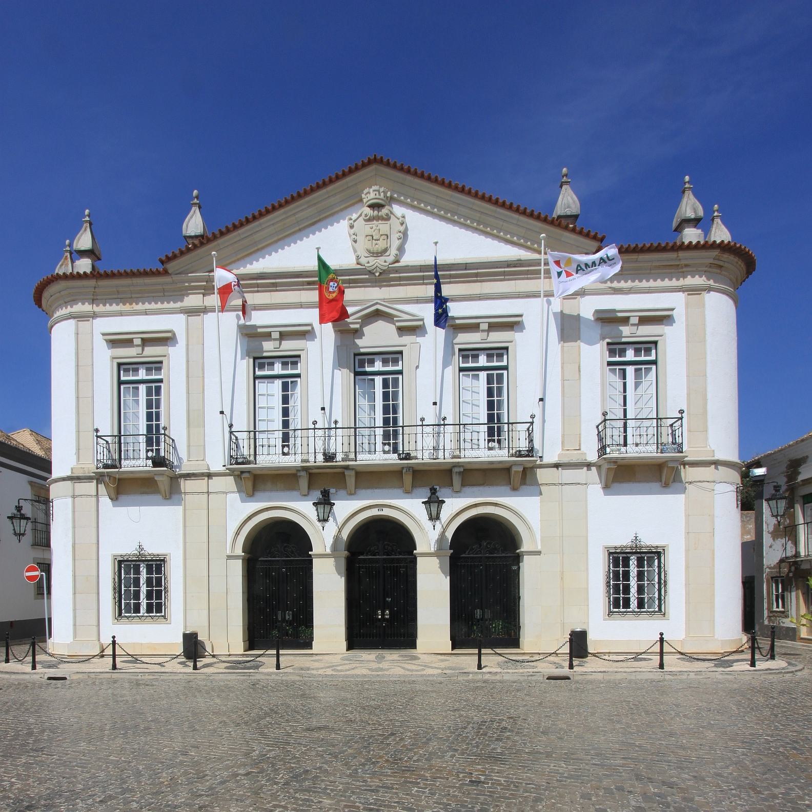 Rathaus, Faro, Algarve, Portugal